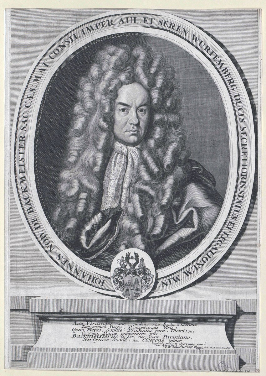 Scan aus dem Bildarchiv Austria